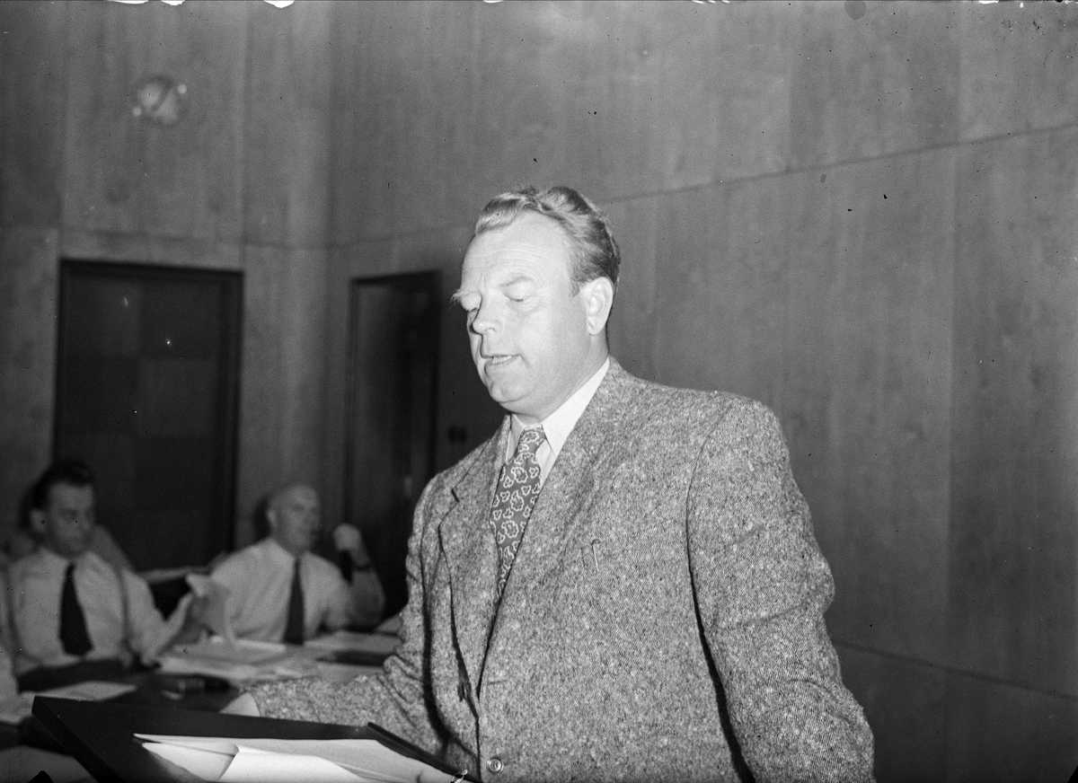 Halvdan Eyvind Stokke (1900-77) fotografert som Akers ordfører i Aker herreds lokaler i Trondheimsveien 5 i Oslo, i juli 1947. Stokke var Akers siste ordfører, og det sammenslåtte Oslos første.